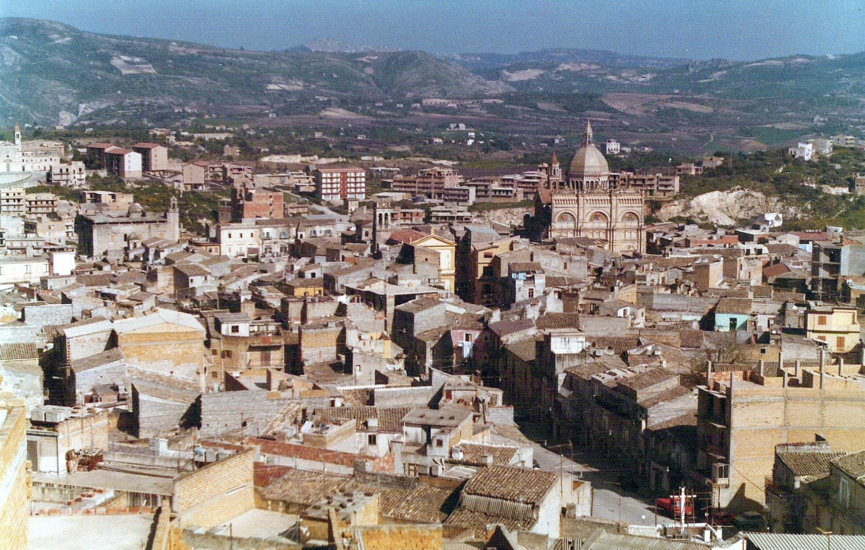 Panorama di Favara, 1982.